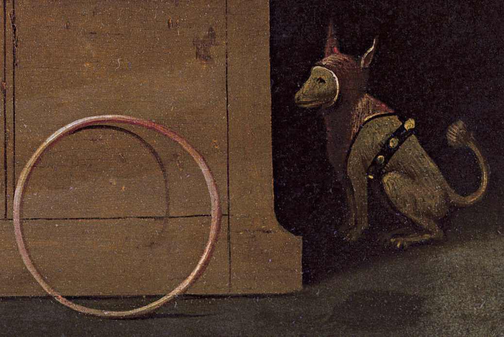 Détail de L'Escamoteur de Jérôme Bosch